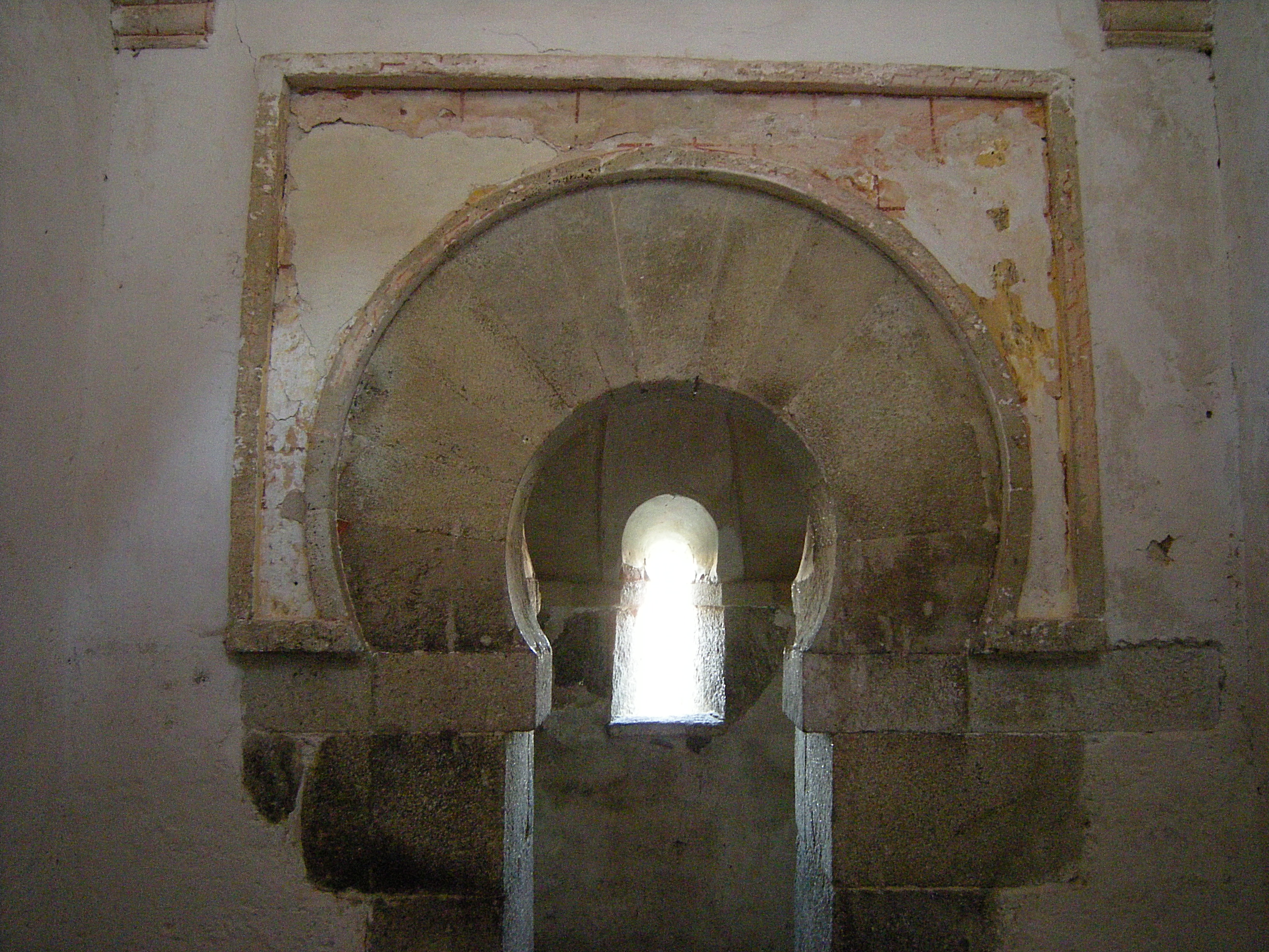 Capela prerrománica de San Miguel de Celanova. Interior